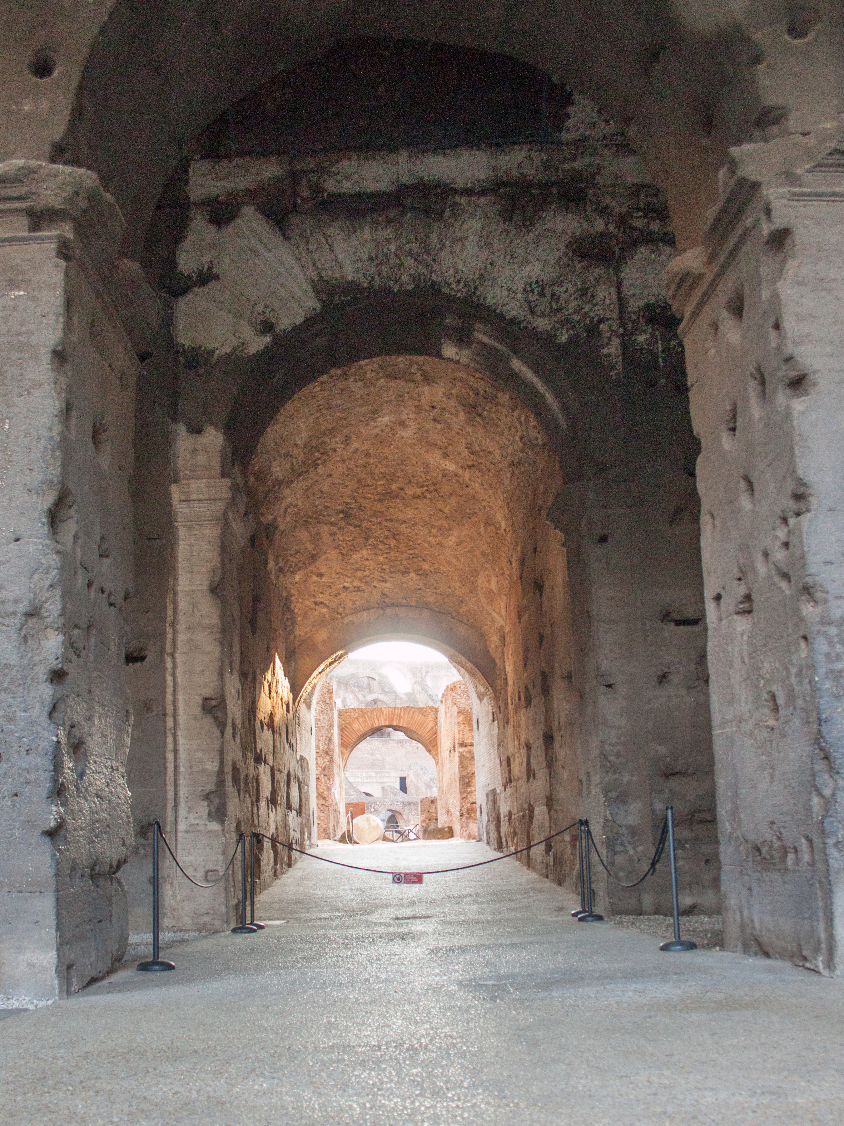 Colosseum inside